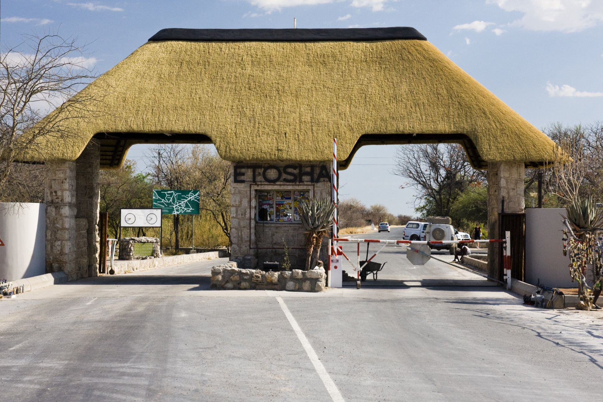 Andersson-Tor, südwestliches Eingangstor zum Etosha-Nationalpark, Namibia